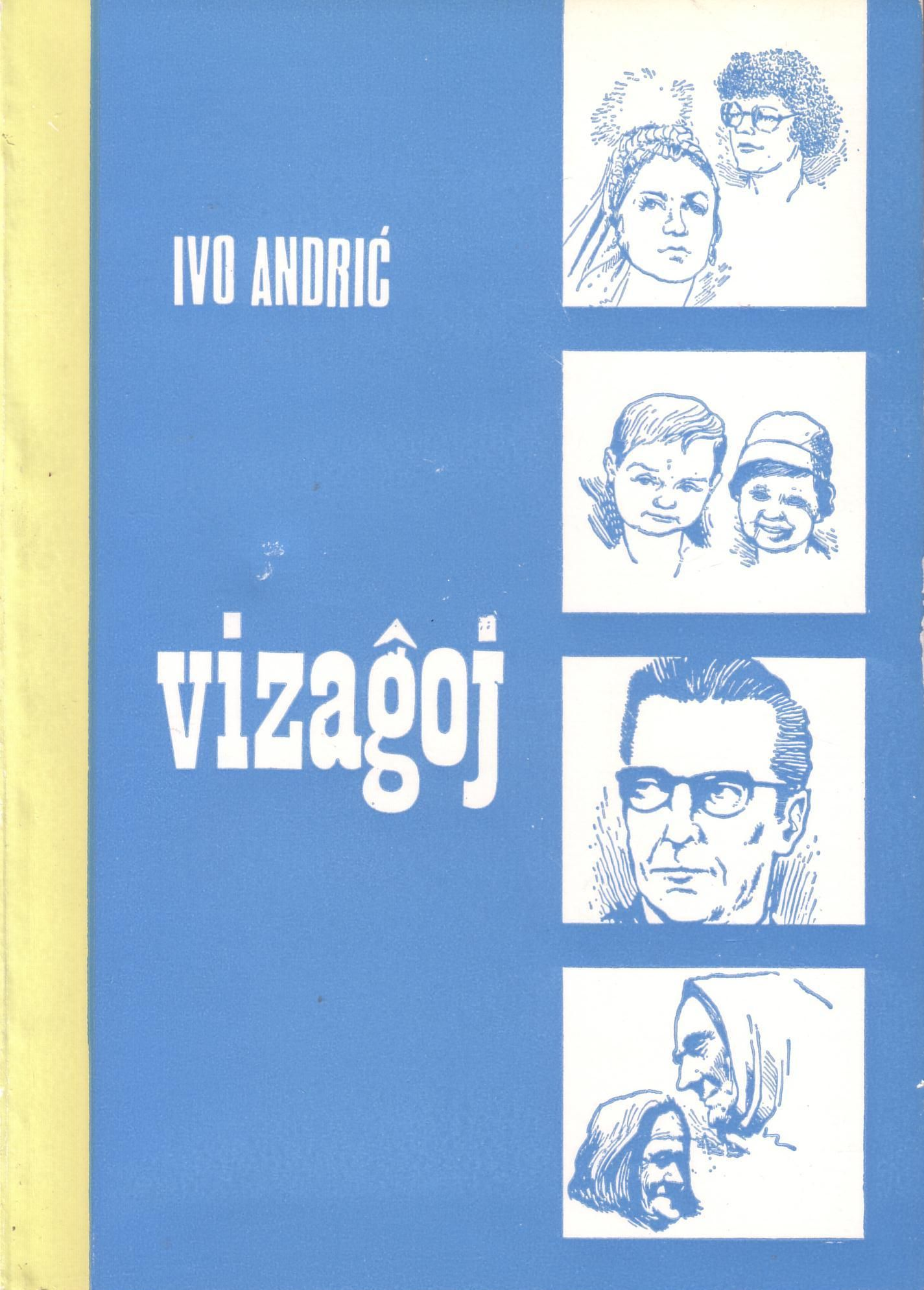 kovrilpagxodevizagxoj